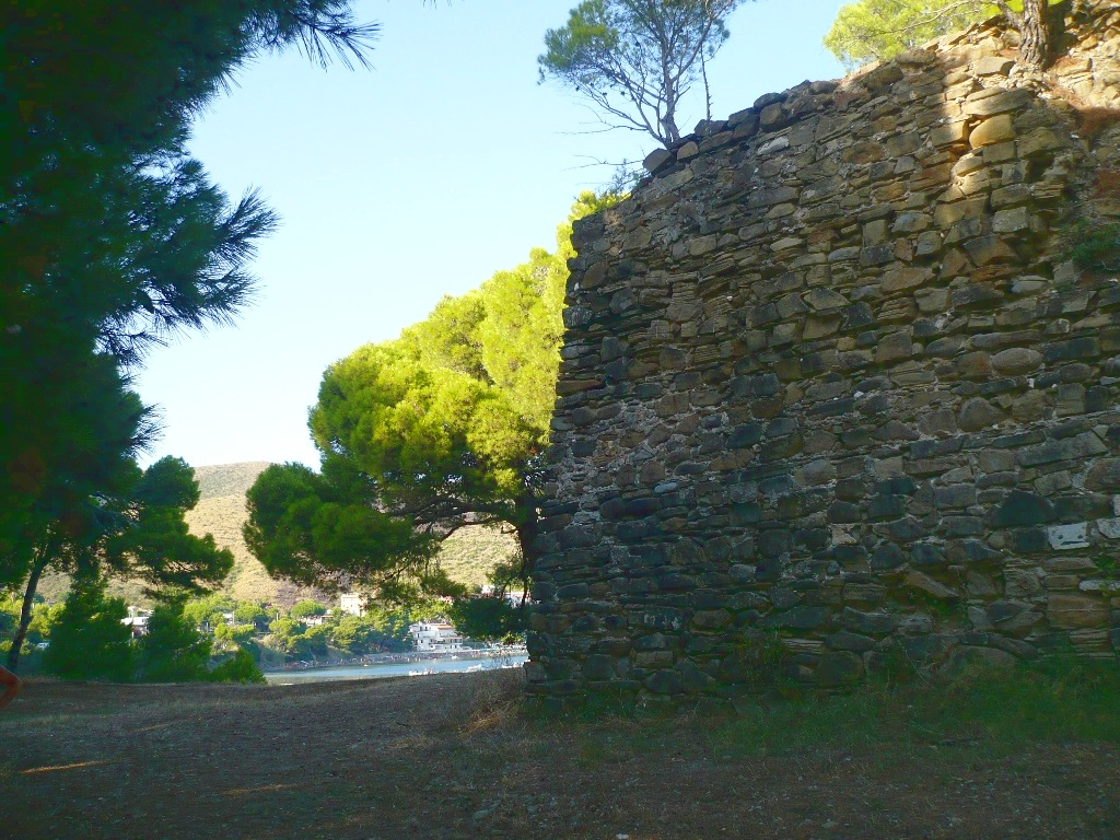 Rudere della torre di ogliastro marina (castellabate).